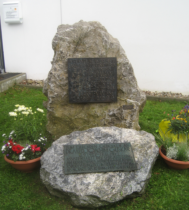 Christoph 1, Gedenksteine und -tafeln, München-Harlaching, 26. Juli 2010